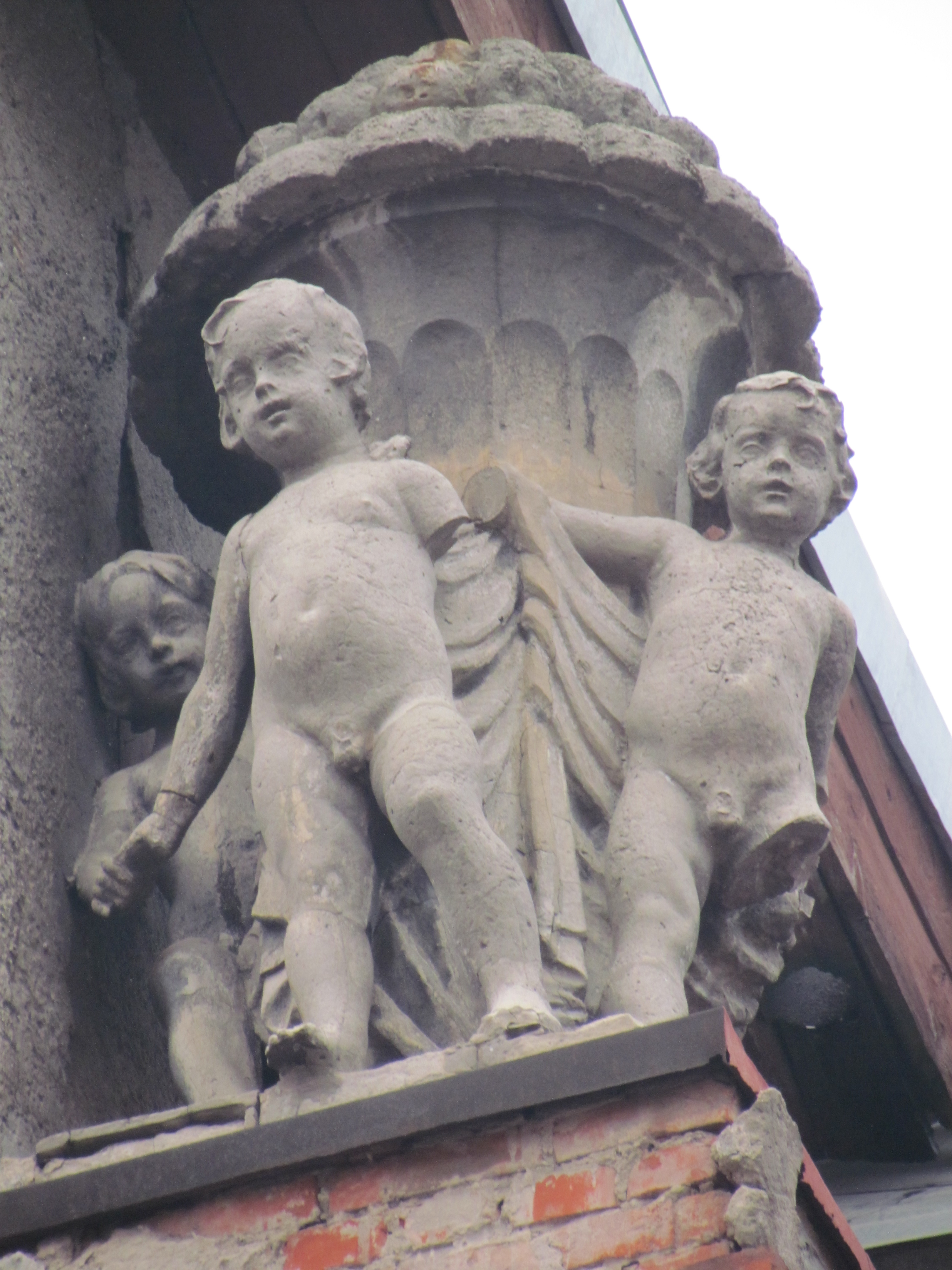 Україна, Харків, вул. Римарська, 19